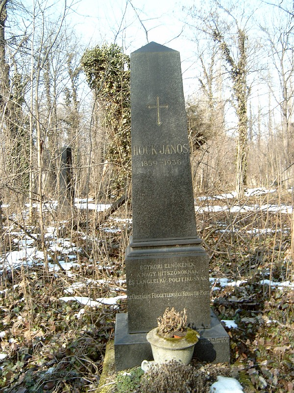 Hock János sírja Budapesten. Kerepesi temető: 48/4-1-35.